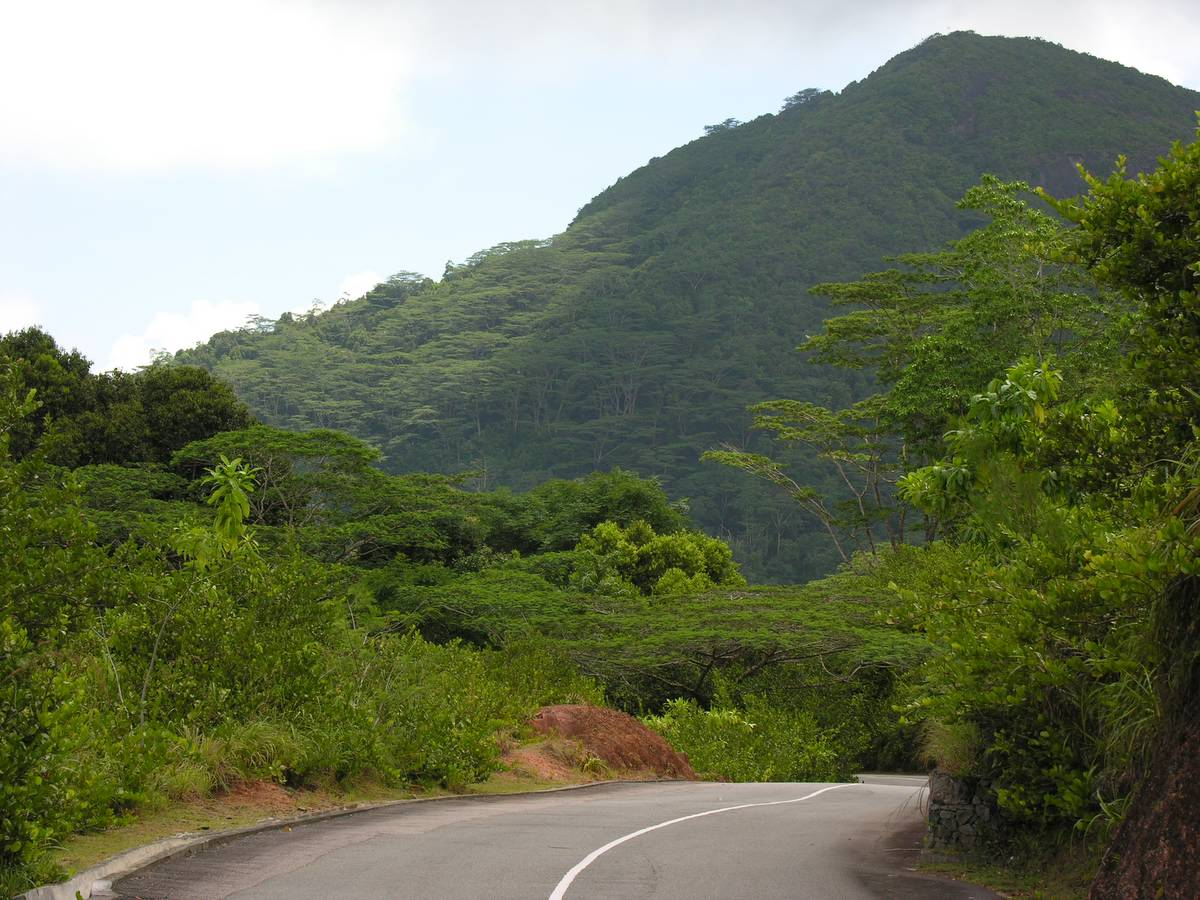 Seychelles, Mahé Island